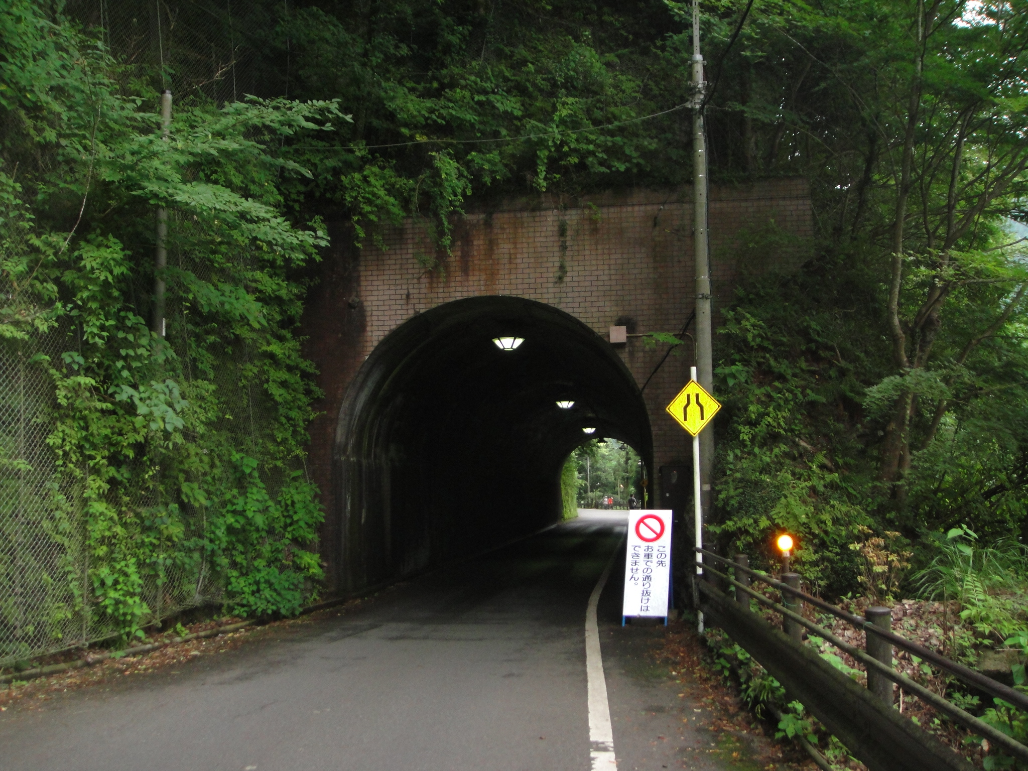 氷川トンネル